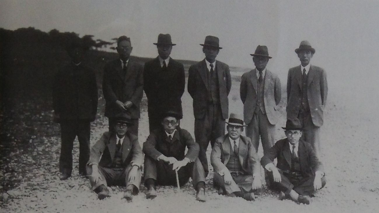 東海大学建設予定地視察時の松前重義（前列左から2番目）と篠原登（前列右端）